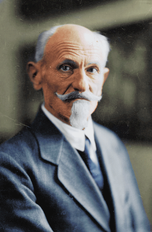 Stanisław Wojciechowski